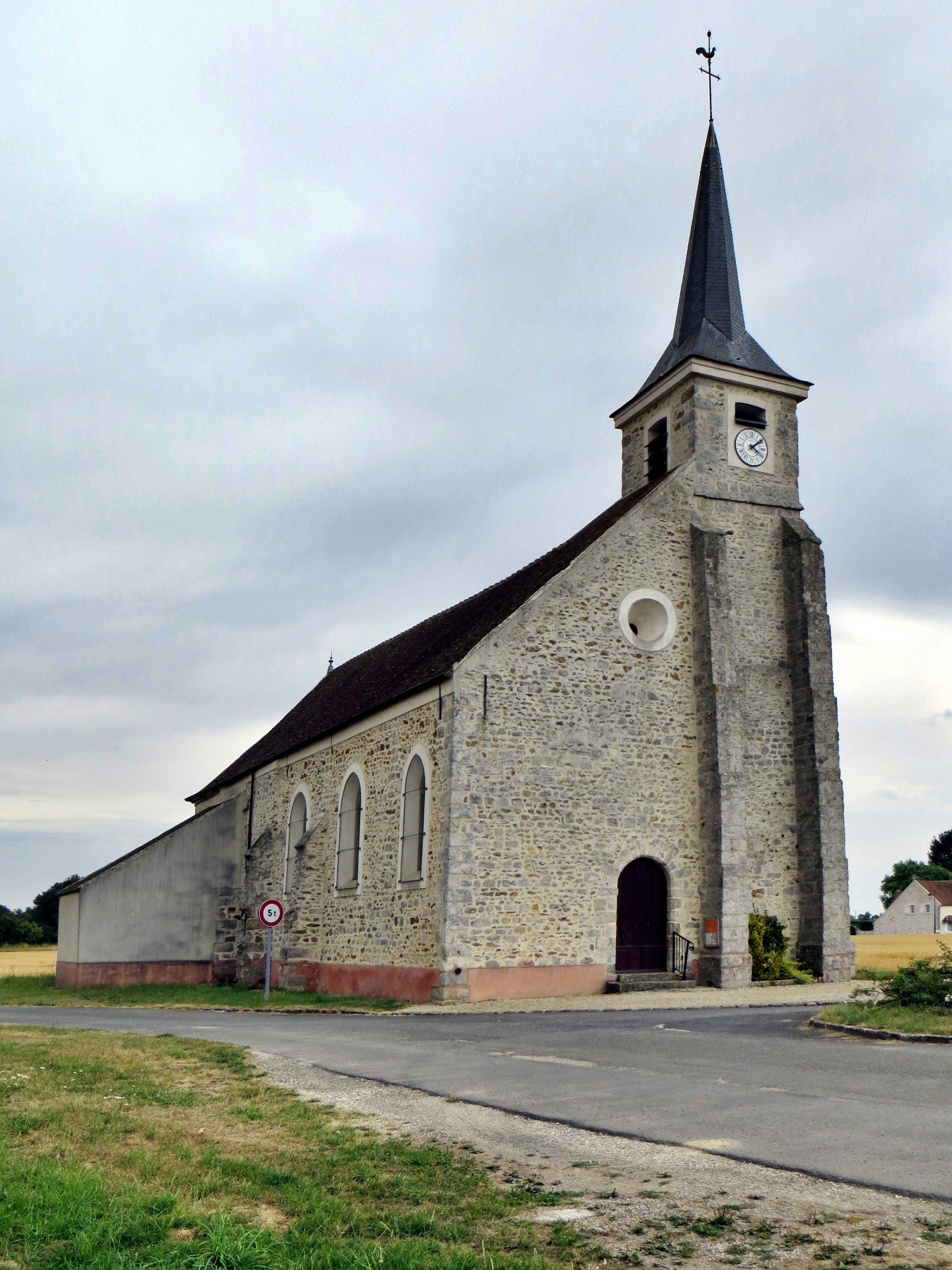 Église Saint Nicolas et Sainte Geneviève de Pézarches